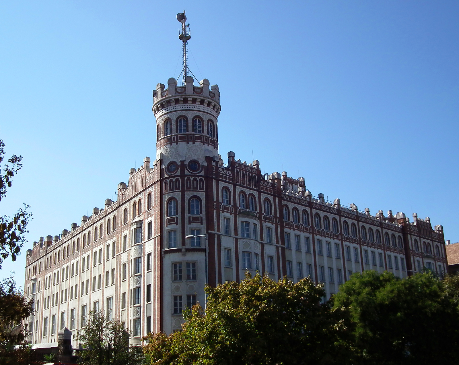 Postapalota (Budapest 12, XII. kerület, Krisztina körút 6-8.) This is a photo of a monument in Hungary. Identifier: 12272